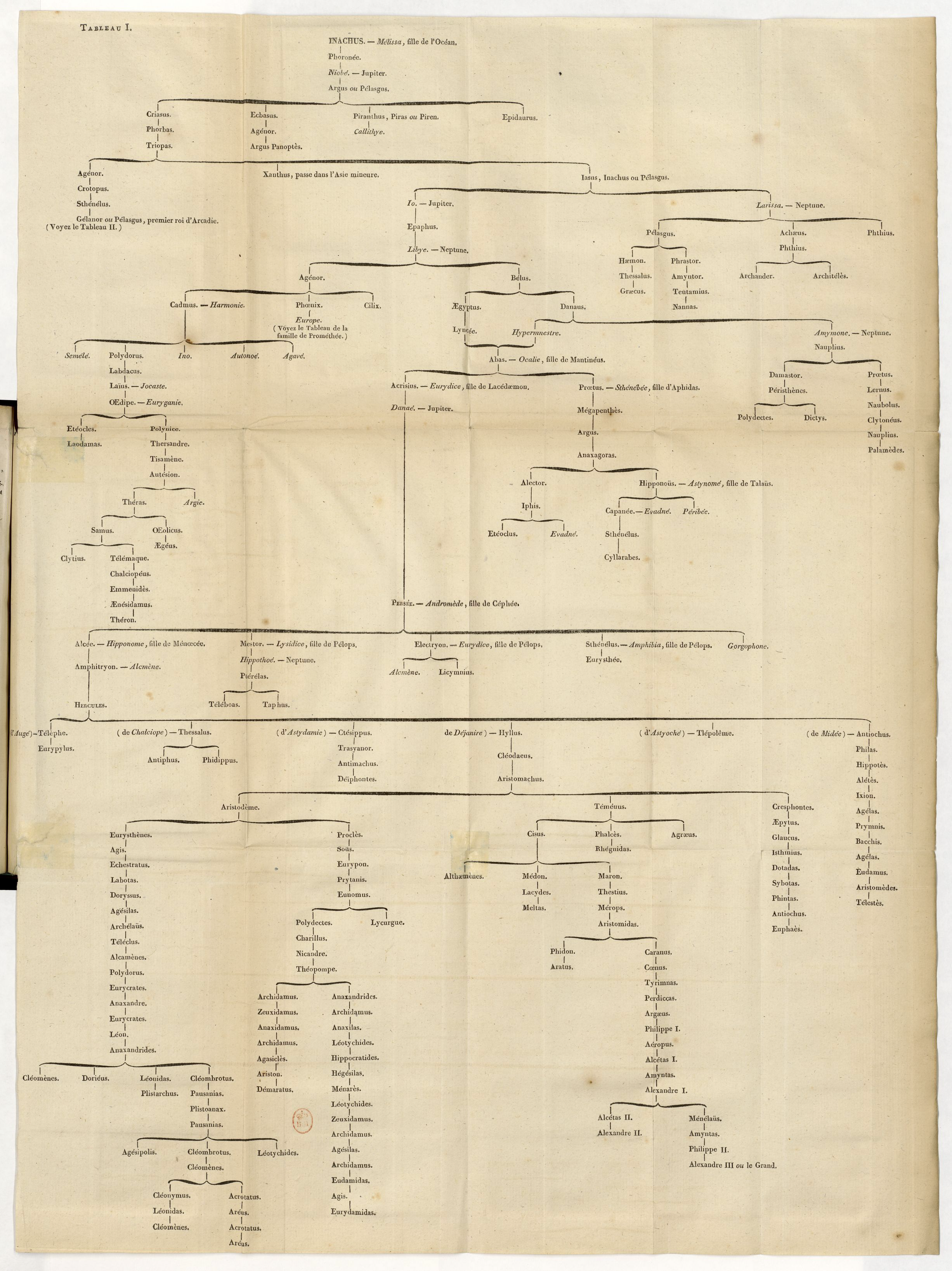 Tableau généalogique n°1, apparu dans l'ouvrage d'Étienne Clavier, Histoire des premiers temps de la Grèce (2e éd. 1822).